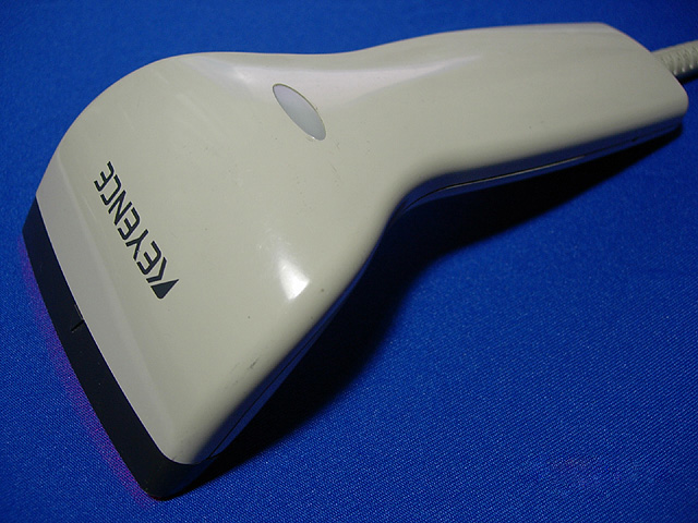 キーエンスのja:バーコードスキャナ、BL-N60UB。USBインターフェース。 なお、PS/2インターフェース、もしくはUSBインターフェースのバーコードスキャナはキーボードとして動作するため、特別なja:デバイスドライバは必要がない。設定もバーコードでおこなう。PS/2インターフェースの場合、もちろん、キーボードも接続できる。(これらはメーカーを問わない) 提供者nmaedaが撮影。